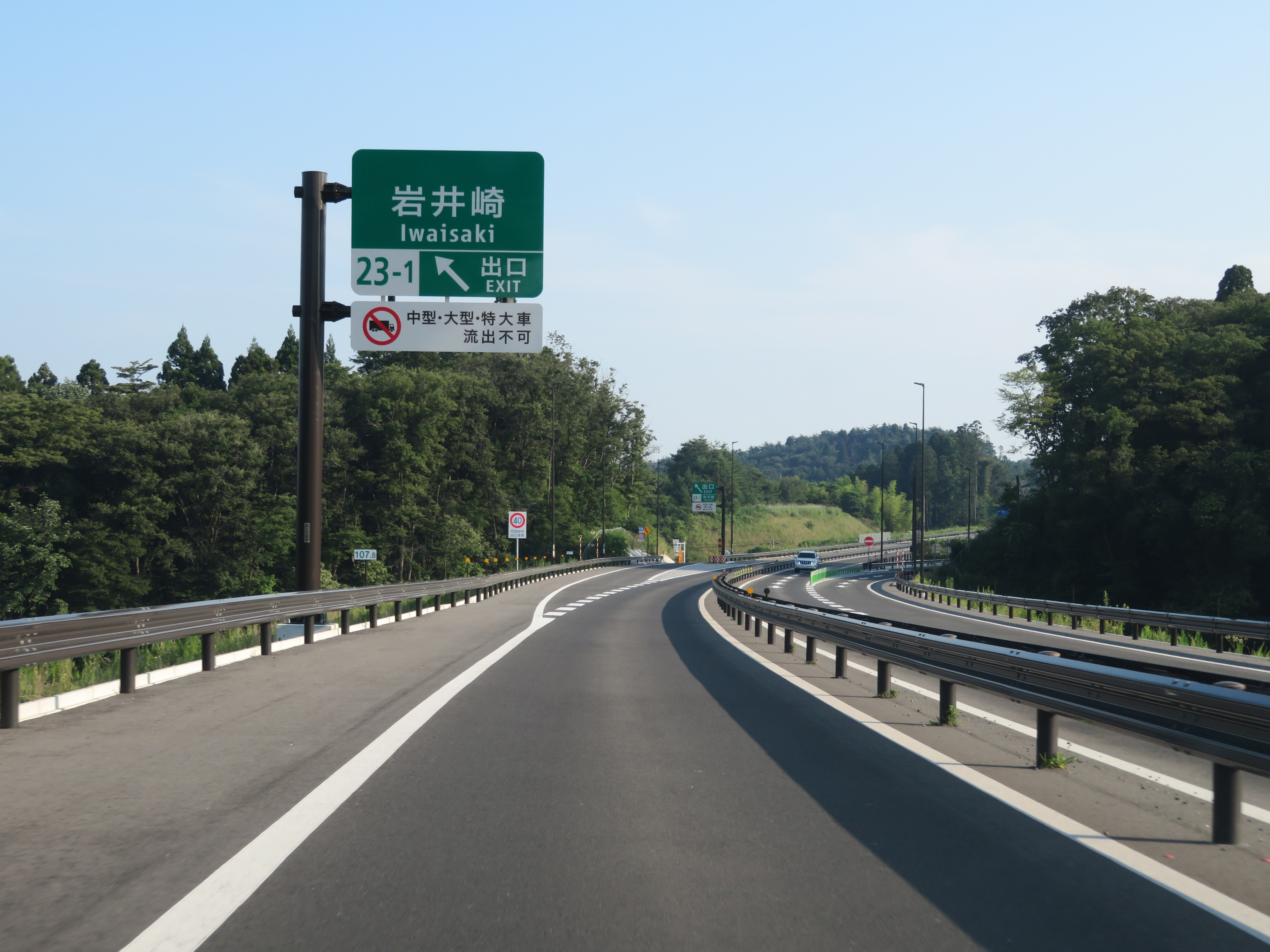 三陸自動車道岩井崎IC出口付近（利府JCT方面を撮影）